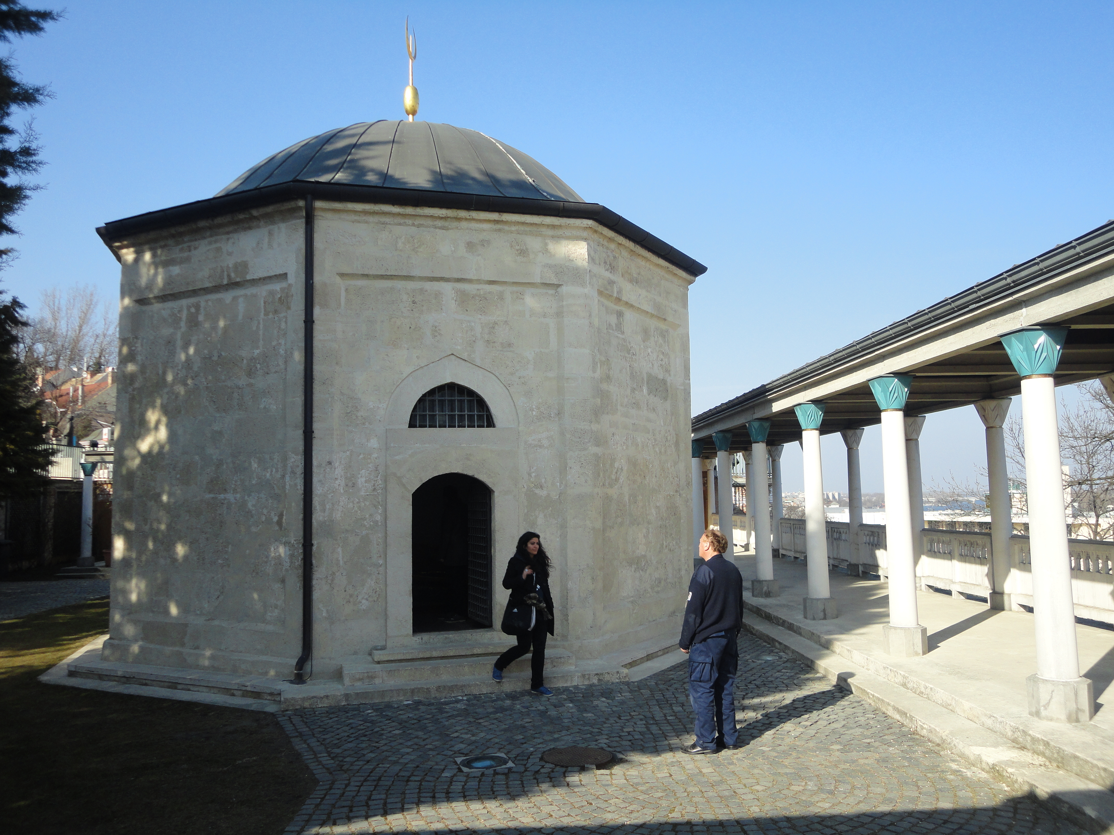 Gül Baba türbéje és az oszlopcsarnok This is a photo of a monument in Hungary. Identifier: 290